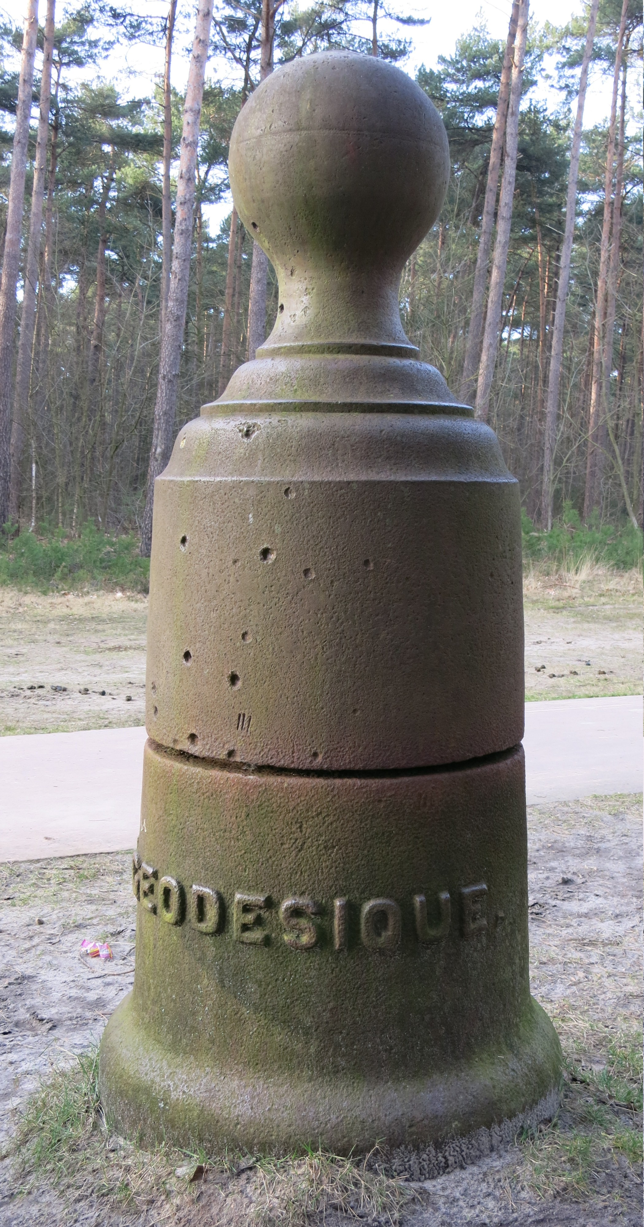 Geodetisch Punt (Station Géodésique) uit 1853 aan de Lommelse Gracht in het Pijnven in Hechtel-Eksel. Zie Wikipedia: Geodetische Basis van Lommel